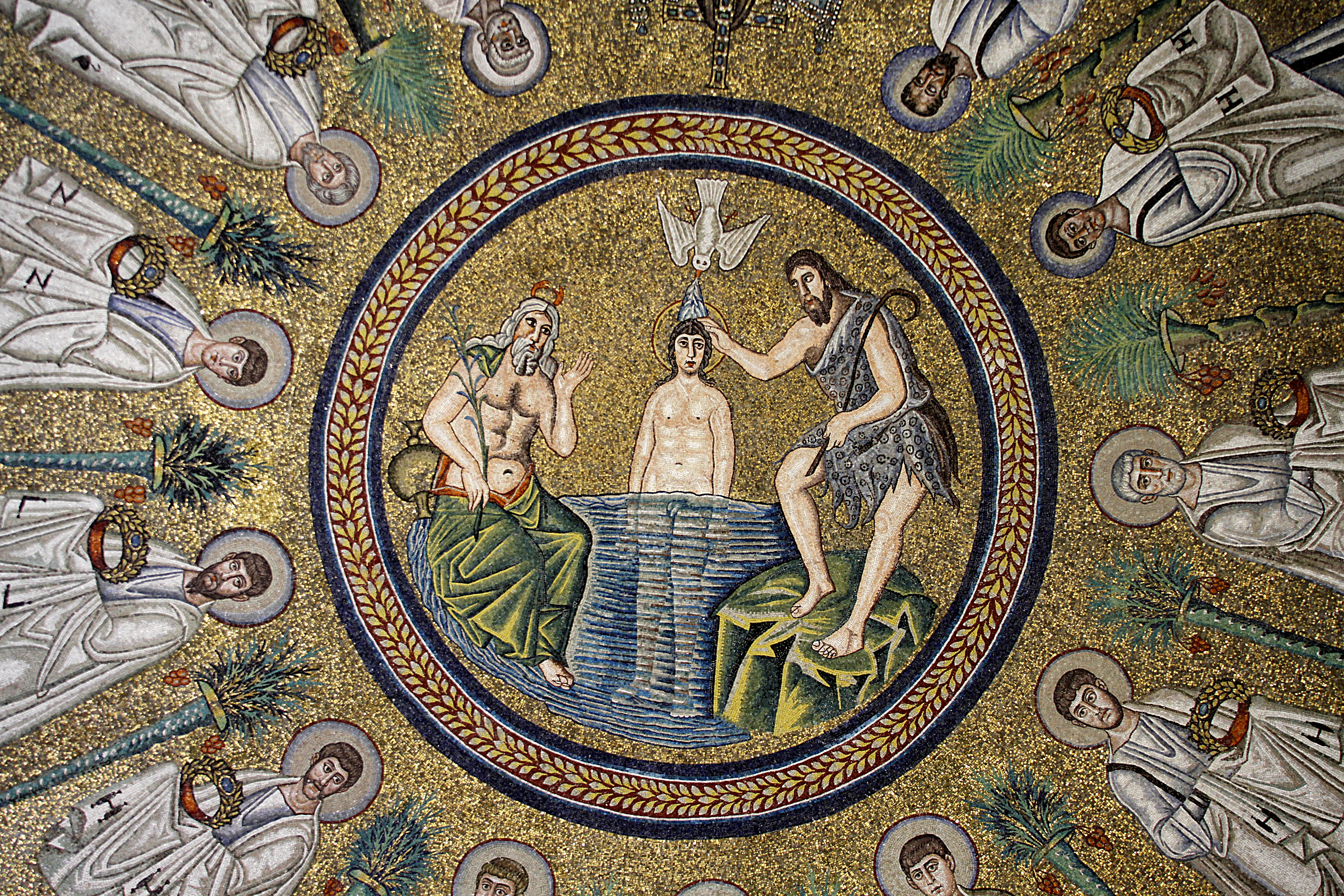 Arian Baptistry - Ravenna